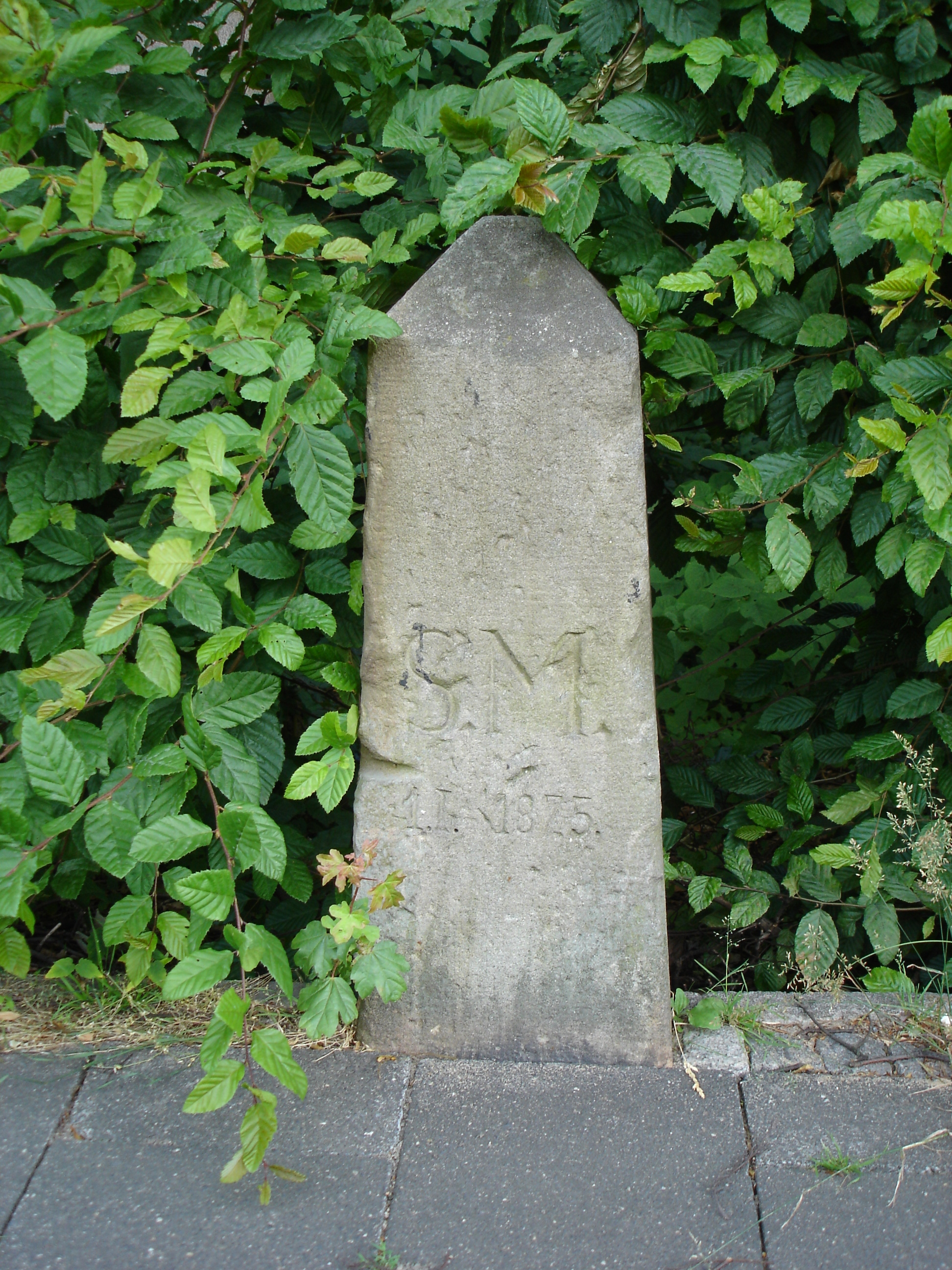 Ehemaliger Grenzstein der Stadt Münster, Westfalen, Deutschland, nach der ersten Eingemeindung vom 1. Januar 1875